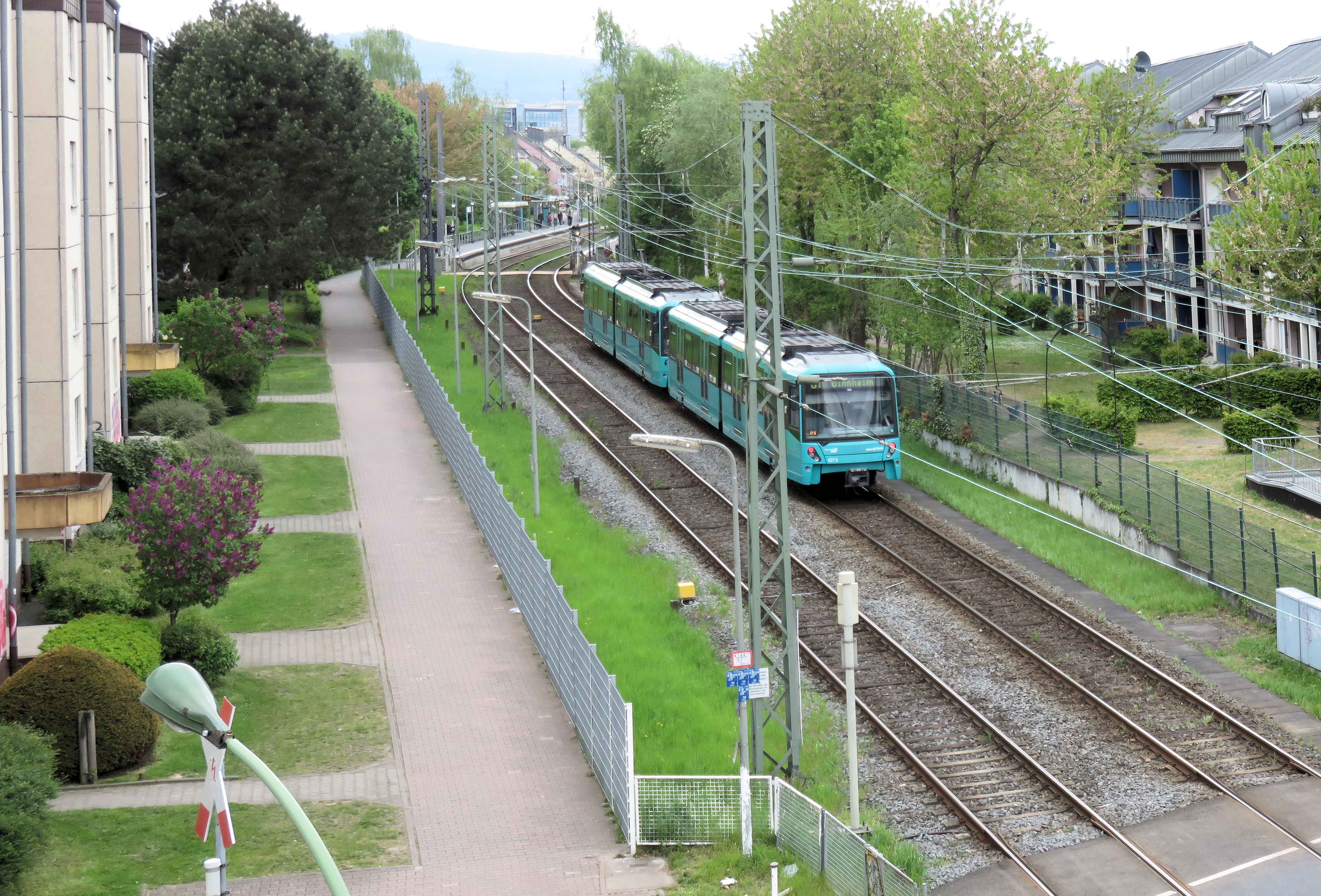 Frankfurt am Main-Heddernheim: Gleiskoerper der U1/U3/U8 zwischen Hessestrasse und U-Bahnhof Zeilweg (im Hintergrund)